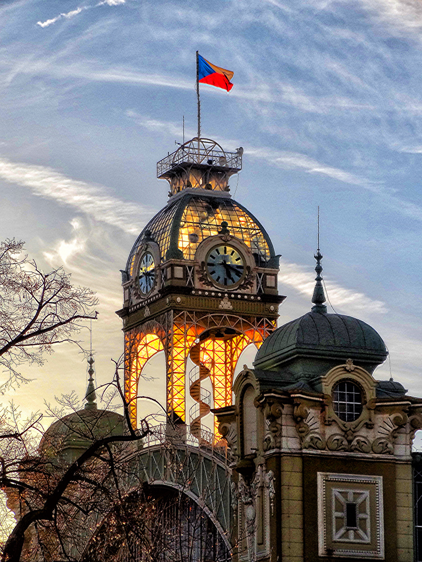 Prague - Výstaviště (2014)